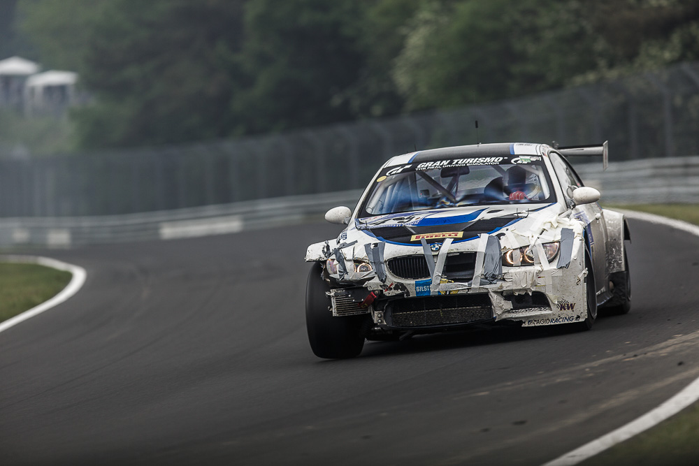 Beschädigtes Fahrzeug (Startnummer 45, Klasse SP8, TC-R & Vetter Motorsport; Fahrer: Philip Göschel, Dirk Heidmann, Rolf Scheibner, Frank Weishar) beim 24-Stunden-Rennen 2016 auf dem Nürburgring. Veröffentlichung mit freundlicher Genehmigung von Björn Fey.